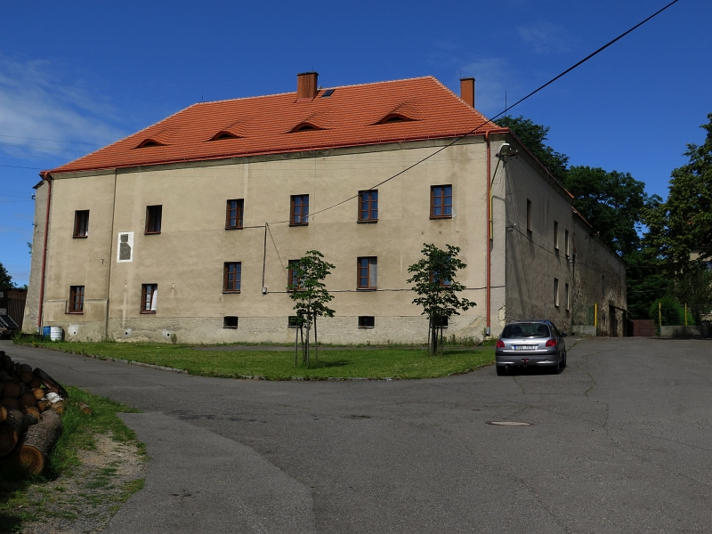 Hvožďany, okres Příbram, čp. 6, tvrz.